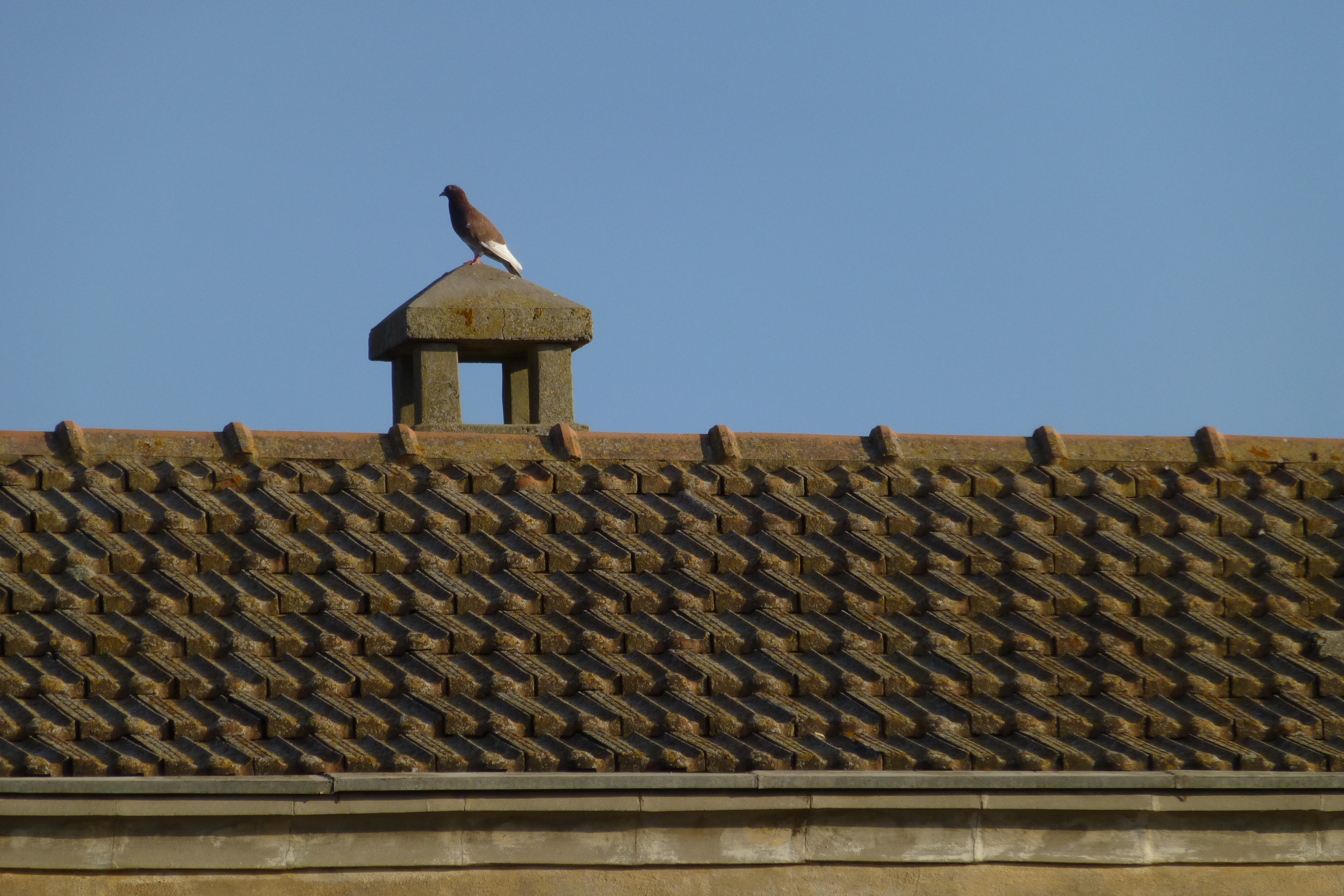 ראשוני המתיישבים באתר היישוב אלוני אבא היו בני הדור השני של תנועת הטמפלרים הגרמנים, אשר הקימו במקום בשנת 1907 מושבה חקלאית קטנה ושמה "ולדהיים".